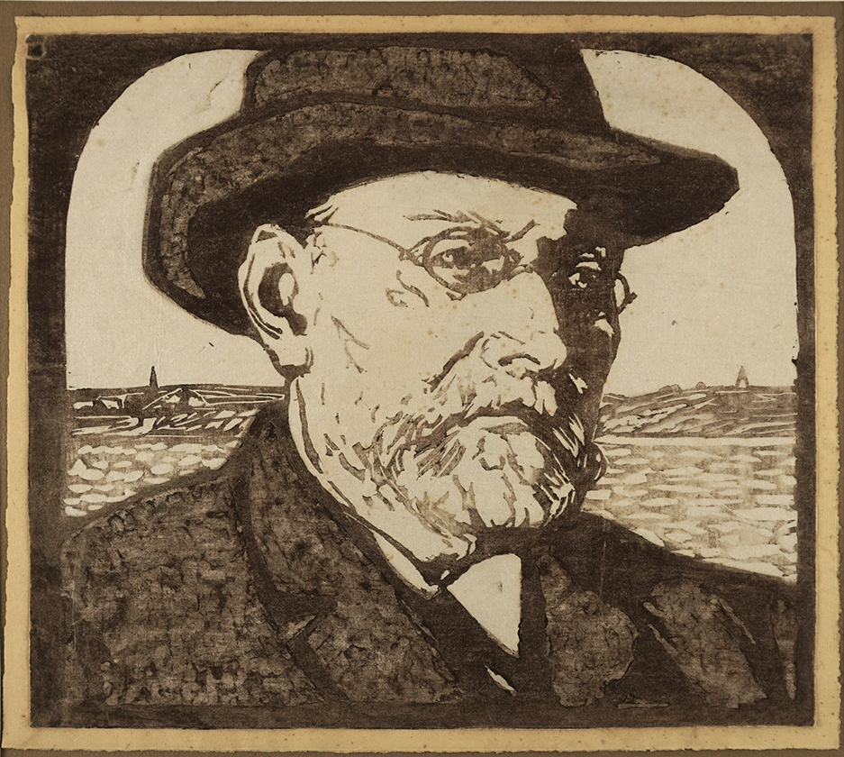 Portrait des Mediziners und Mikrobiologen Robert Koch als Schulterstück vor Landschaftshintergrund. Um 1910. Holzschnitt in Braun auf Japan-Maschinenbütten, auf Papier fixiert. Blatt 34,8 x 39,8 cm